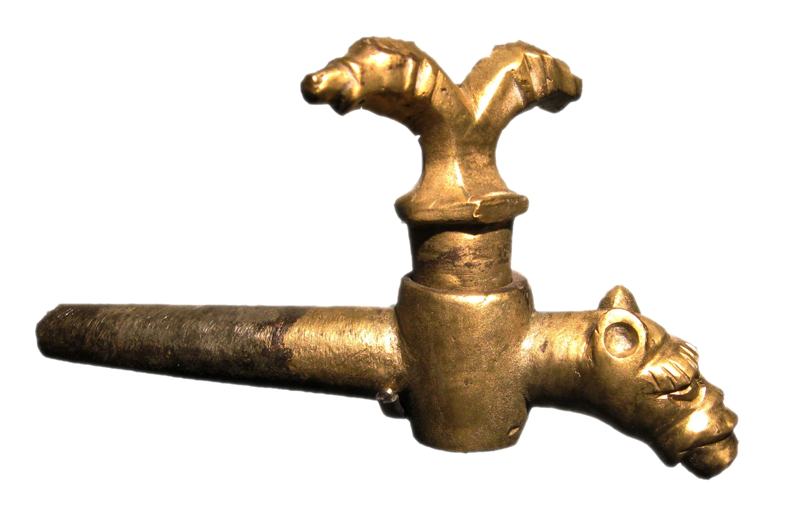 Ventil im Museum Ten Duinen